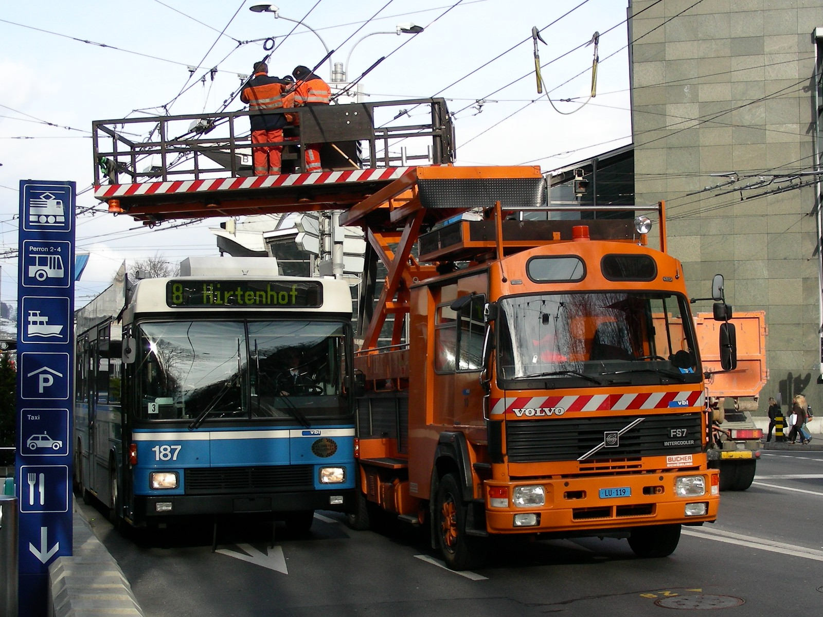 Der NAW/Hess/Siemens BGT 5-25 Nr. 187 unterquert den Volvo FS7 Intercooler Turmwagen Nr. 10, Luzern Bahnhof